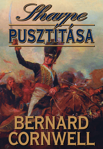 Bernard Cornwell: Sharpe pusztítása c. könyv borítója